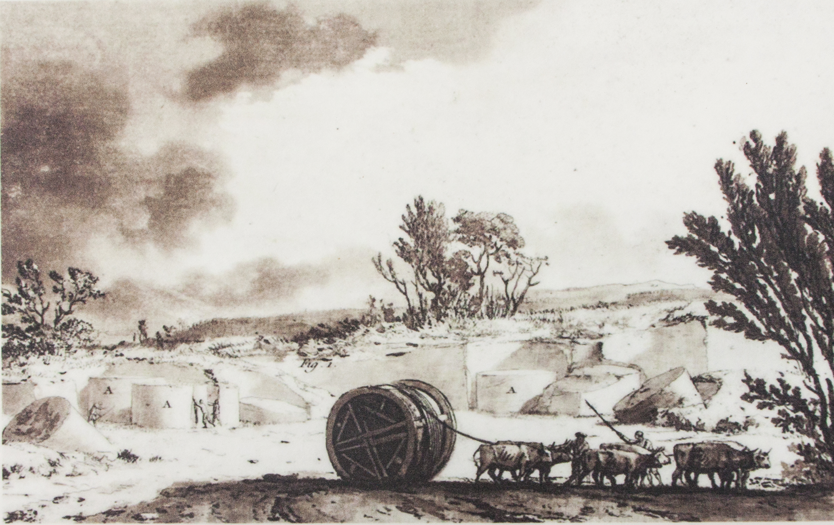 Carrière de Selinunte - Jean Houel 1872